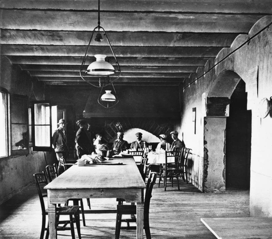 Interior del Xalet d'Ulldeter. Cèsar August Torras i Ferreri (ca. 1909) This is a a photo of a natural area in Catalonia, Spain, with id: ES510095